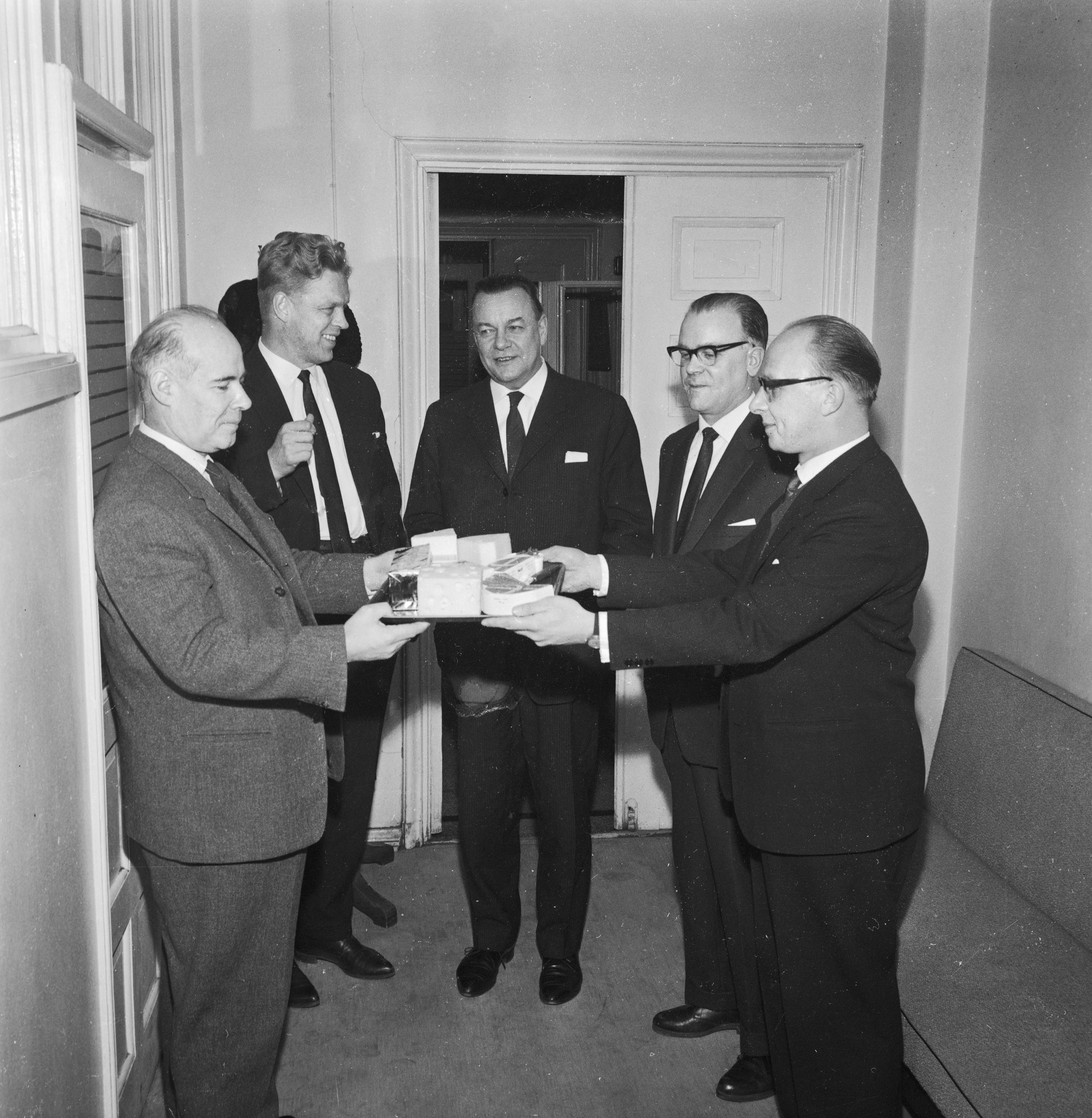 Nk. Kätilöopiston jutun asianosaisia valtakunnanoikeuden istunnossa Säätytalossa, sisä- ja oikeusministeri Vilho Väyrynen toinen vasemmalta.